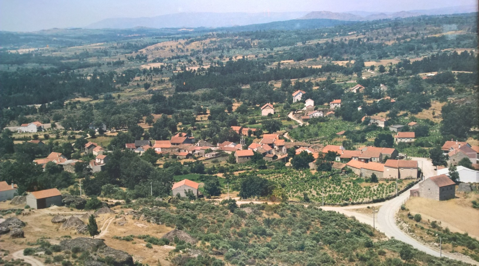 Vista Parcial de Abitureira